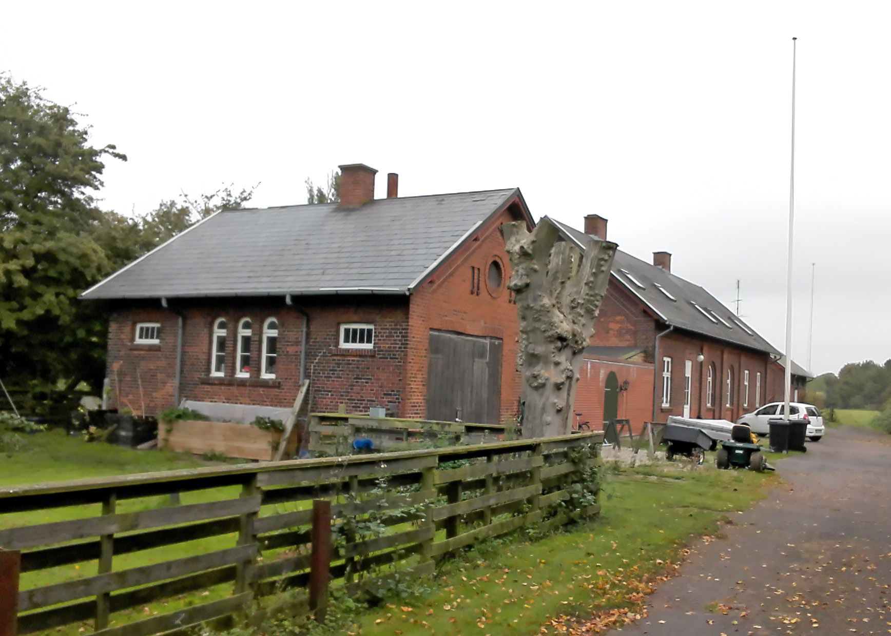 Væggerløse Station, vejsiden fra sydøst